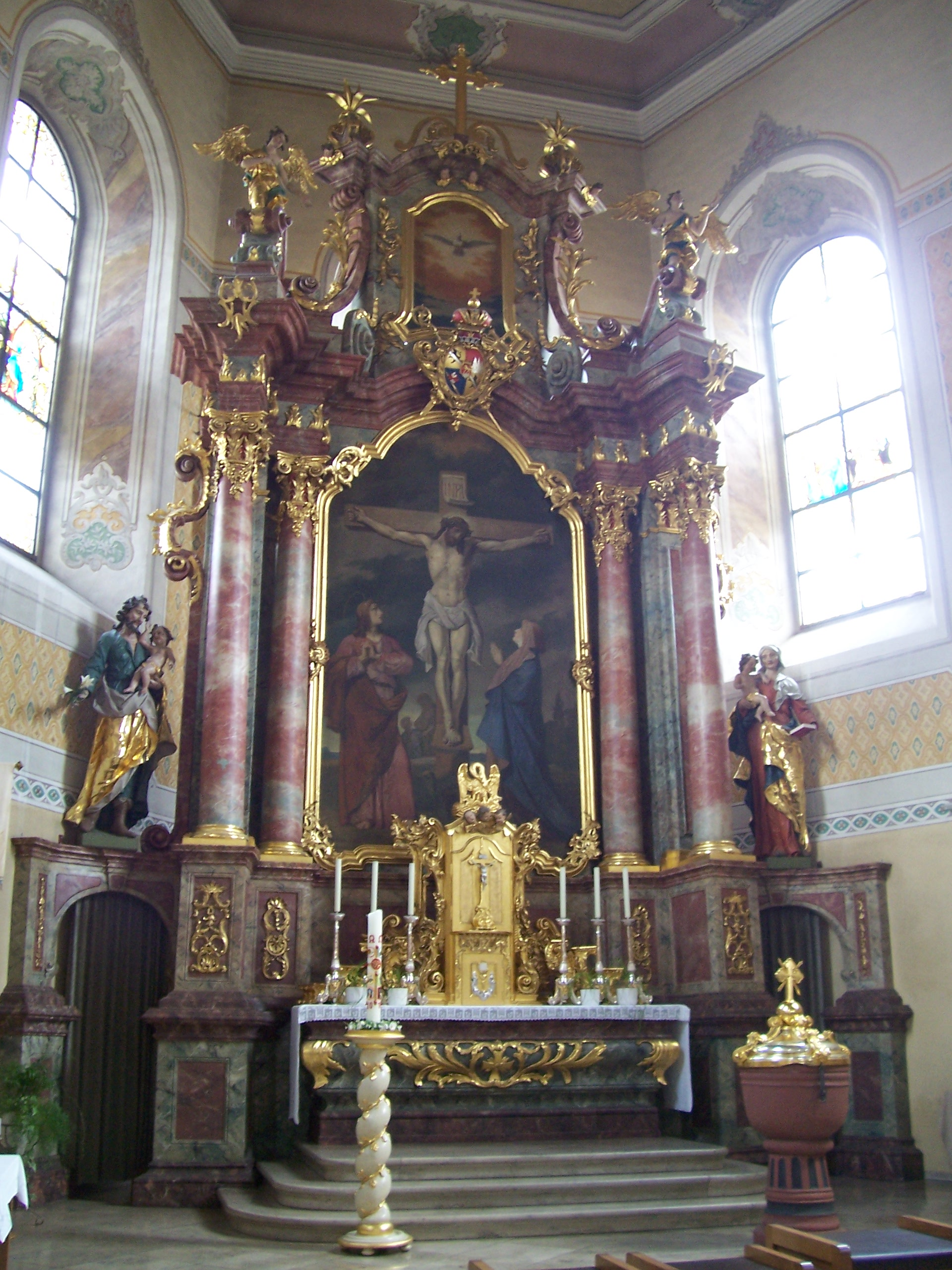 Hochaltar in St. Vitus in Dittigheim (Tauberbischofsheim). Altarbild zeigte ursprünglich St. Vitus und wurde 1880 ersetzt; das jetzige Bild von Wilhelm Dürr aus Freiburg stellt Jesus am Kreuz mit den Trauenden Johannes und Maria dar. Statue links: Josef mit Jesuskind. Statue rechts: Anna mit Tochter Maria. Über Altarbild: Wappenschild des Altarstifters Fürstbischof Carl von Schönborn. Oberes Gemälde: Heiliger Geist als Taube. Taufstein von 1598 aus der Vorgängerkirche.